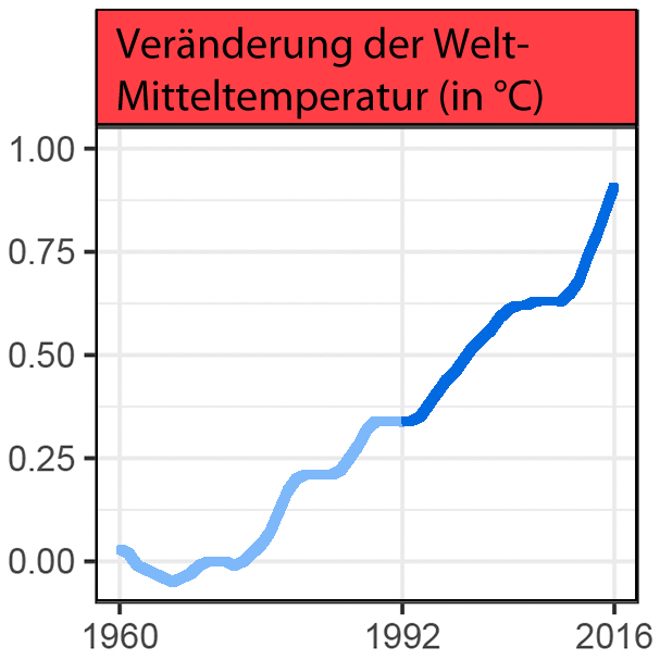 Veränderungen der Welt-Mitteltemperatur nach „World Scientists’ Warning to Humanity: A Second Notice“ 2017